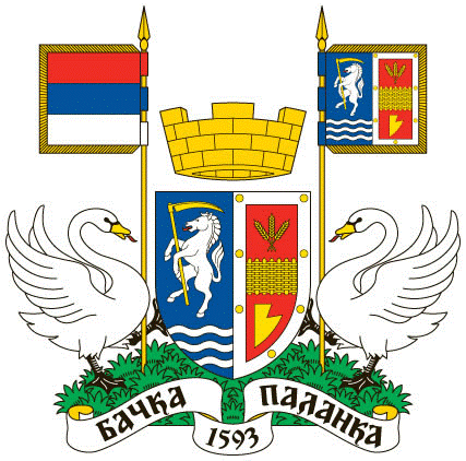 Blason de la ville de Bačka Palanka en Serbie, Voïvodine